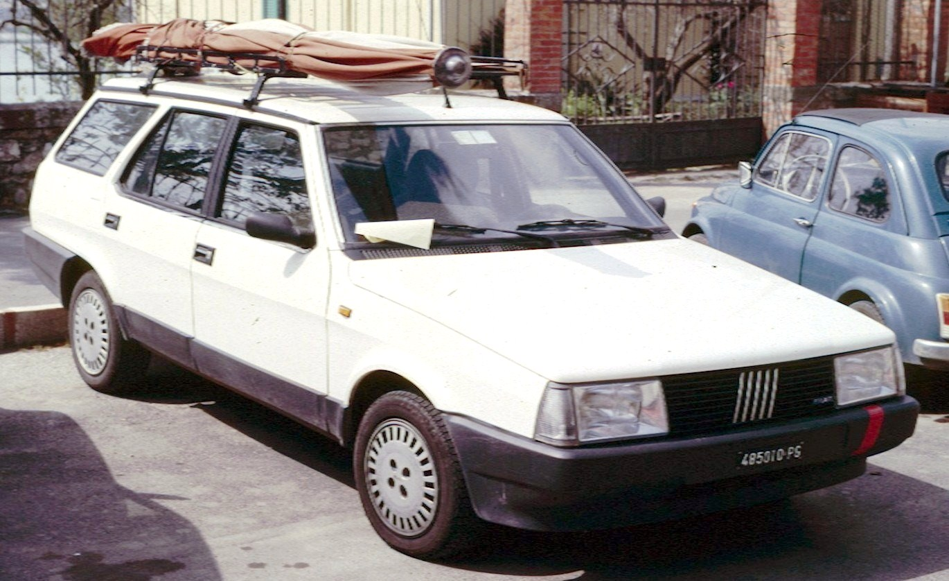 Fiat Regata Weekend / Break from Perugia.